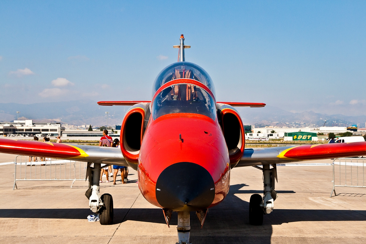 CASA C-101 - Patrulla Águila